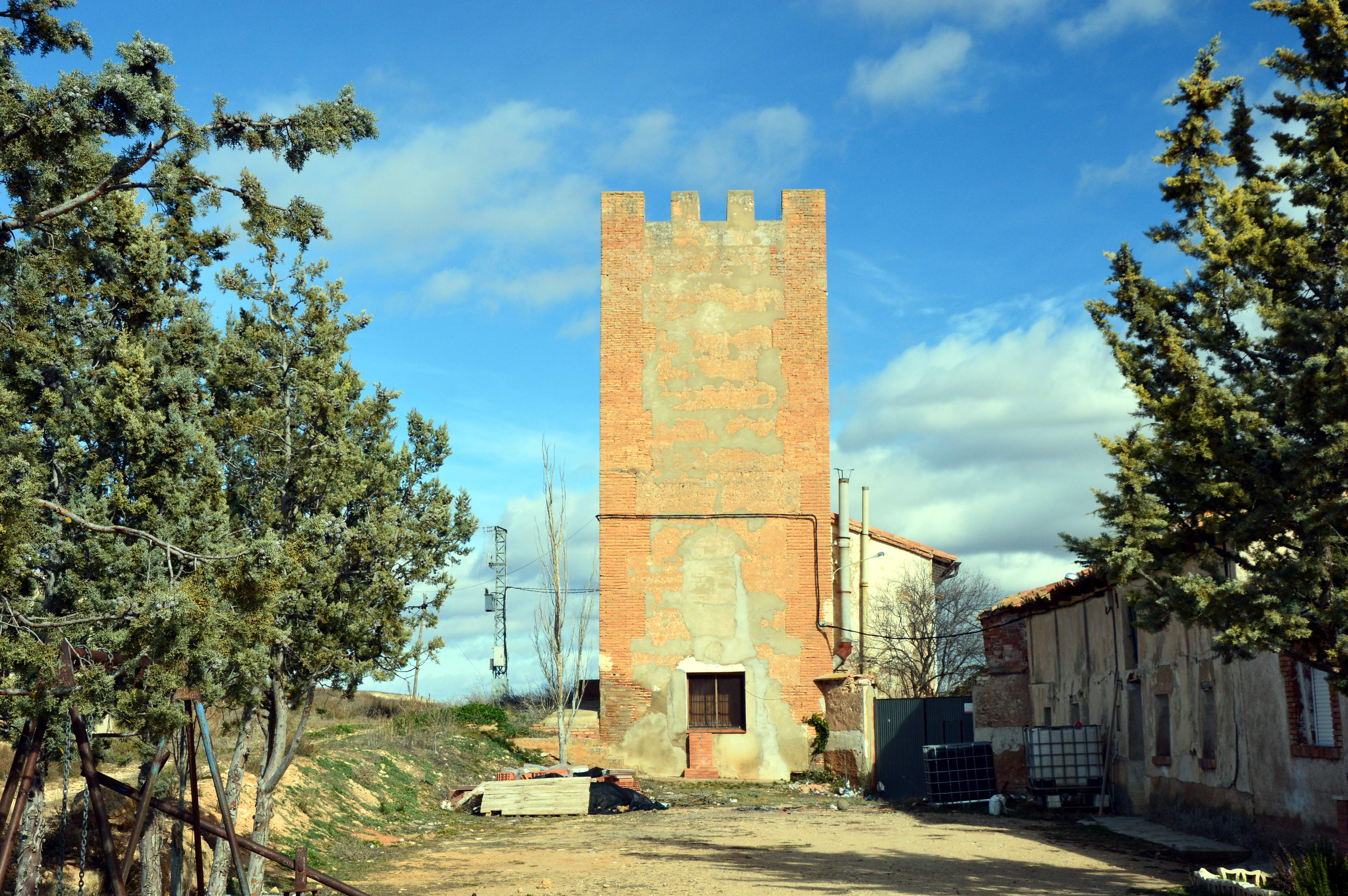 Vista frontal (meridional) de la Torre de Villastar (Teruel), en el contexto de la masía (2019).